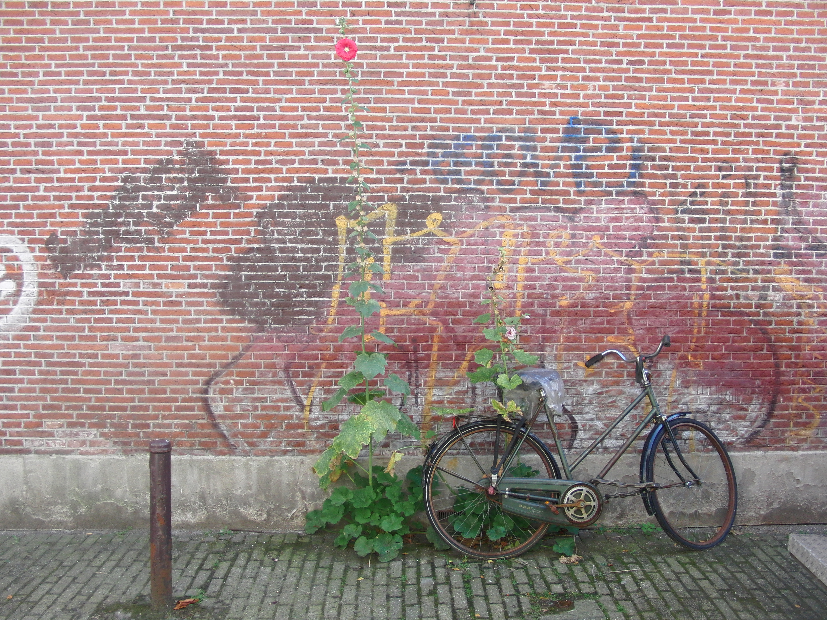 2009 Bicycle in Amsterdam